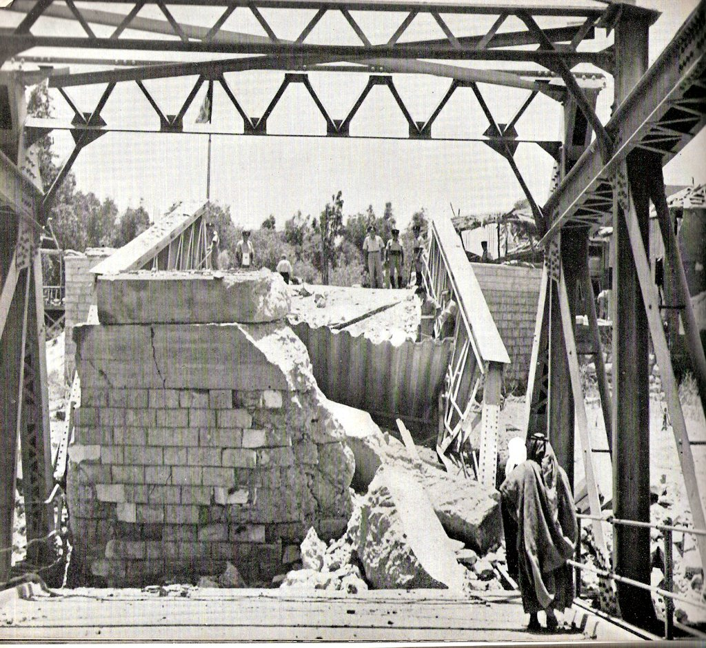 he:גשר אלנבי לאחר שפוצץ בhe:ליל הגשרים.